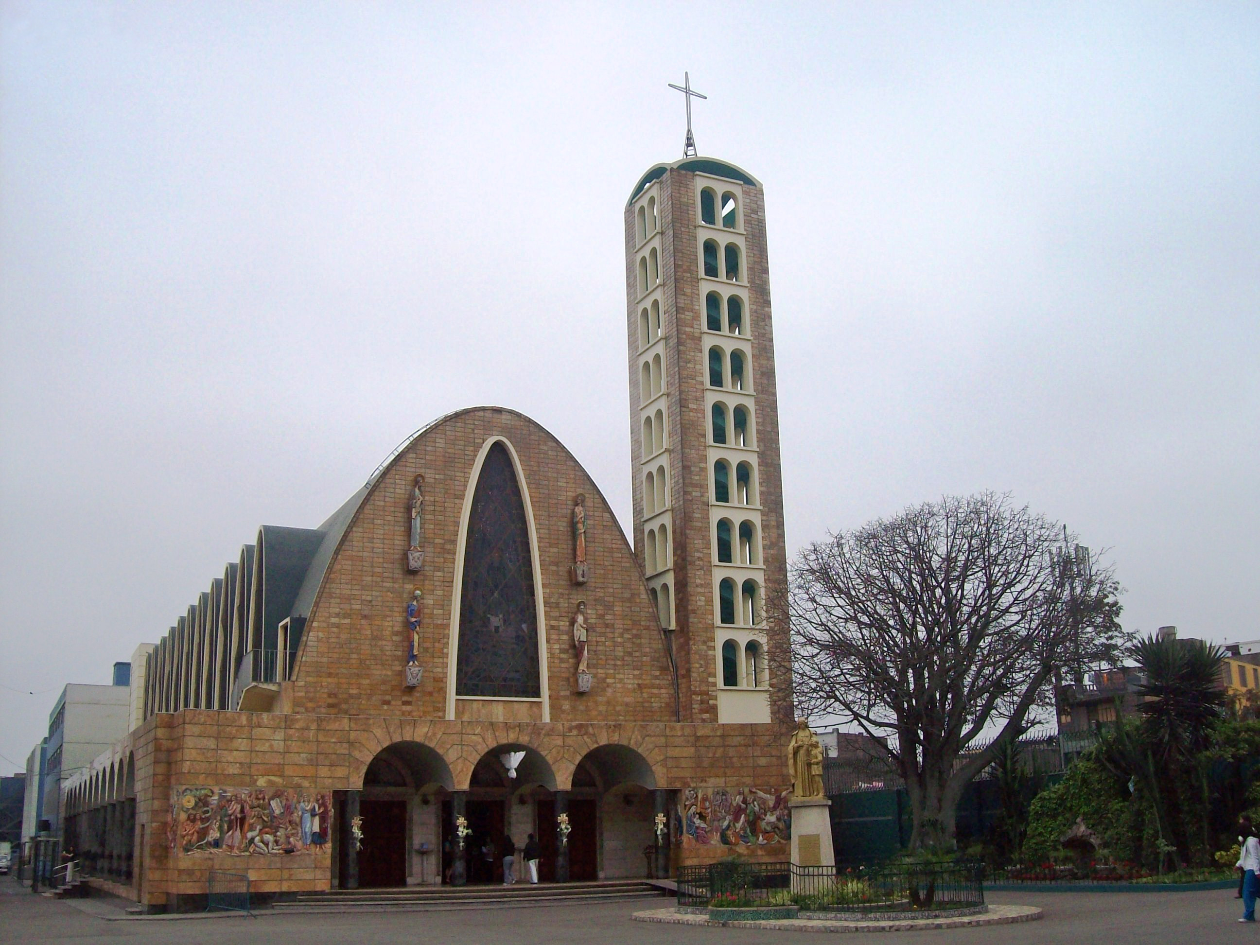 Capilla del Colegio La Salle en la sexta cuadra de la Avenida Arica en el distrito de Breña, Lima, Perú.